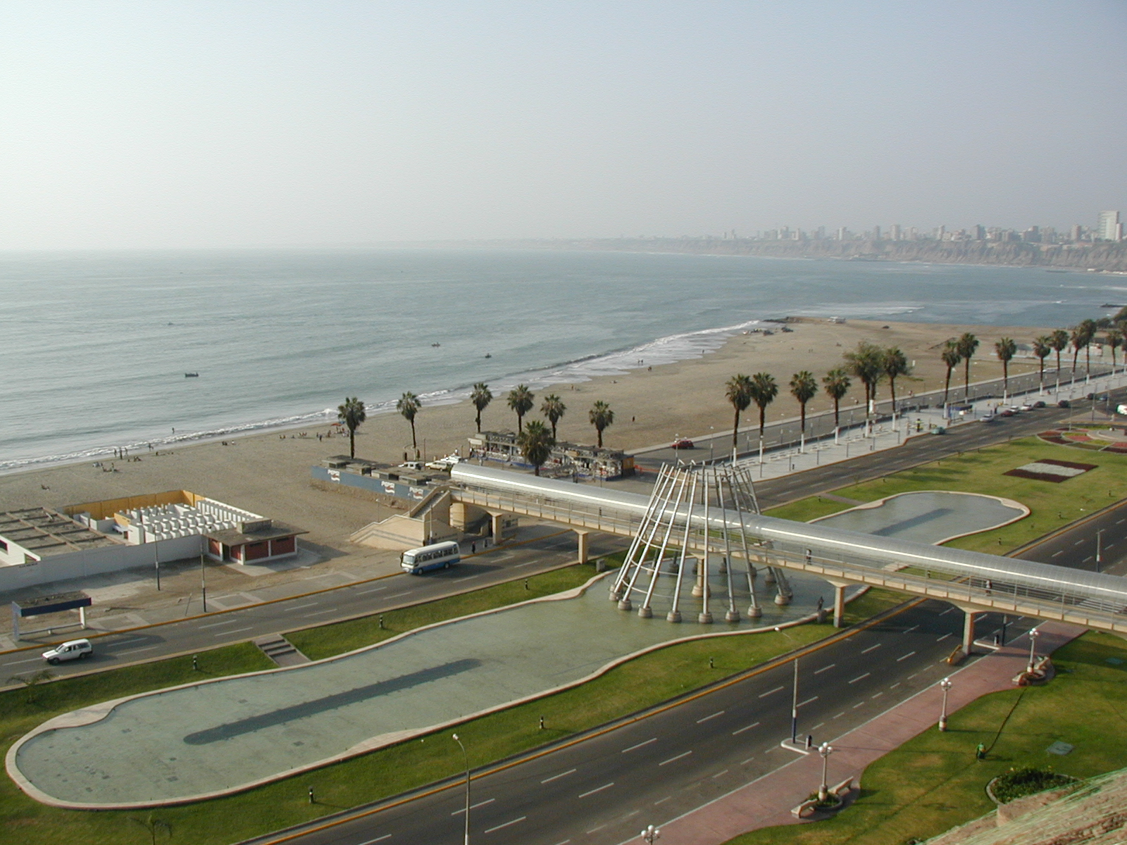 Plage d'Agua Dulce à Chorillos (Lima, Péru) Décembre 2004